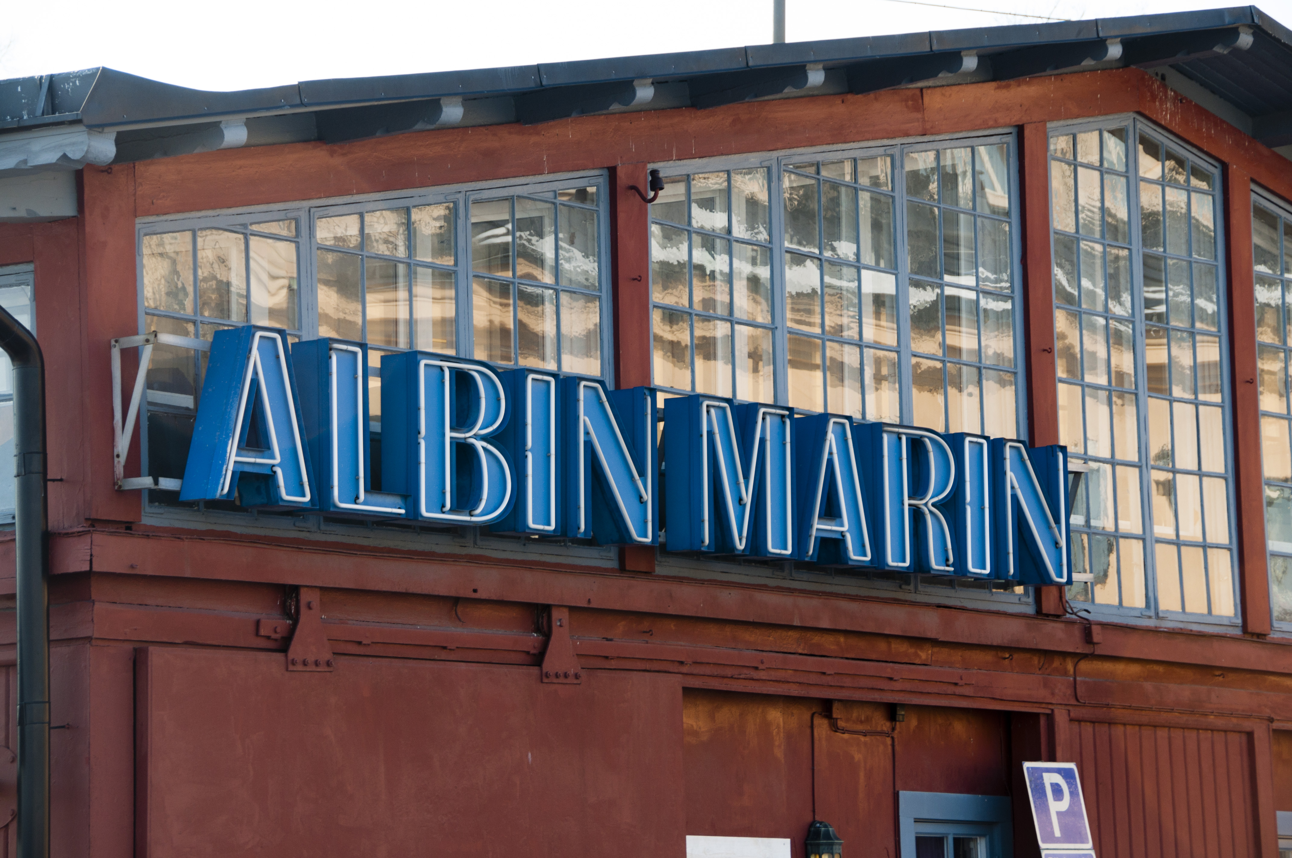 Hamnskjulen på Blasieholmen